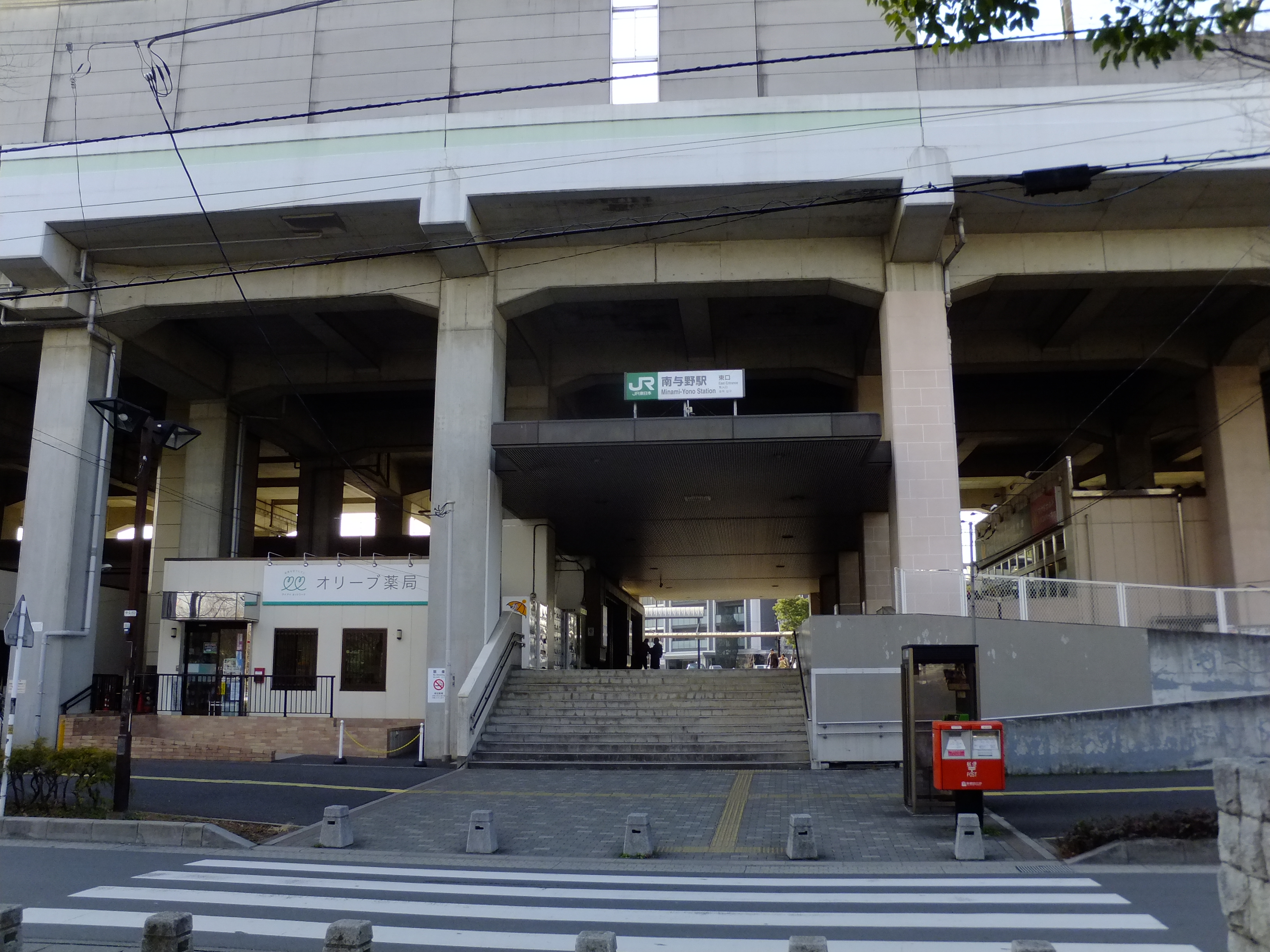 埼京線・南与野駅東口